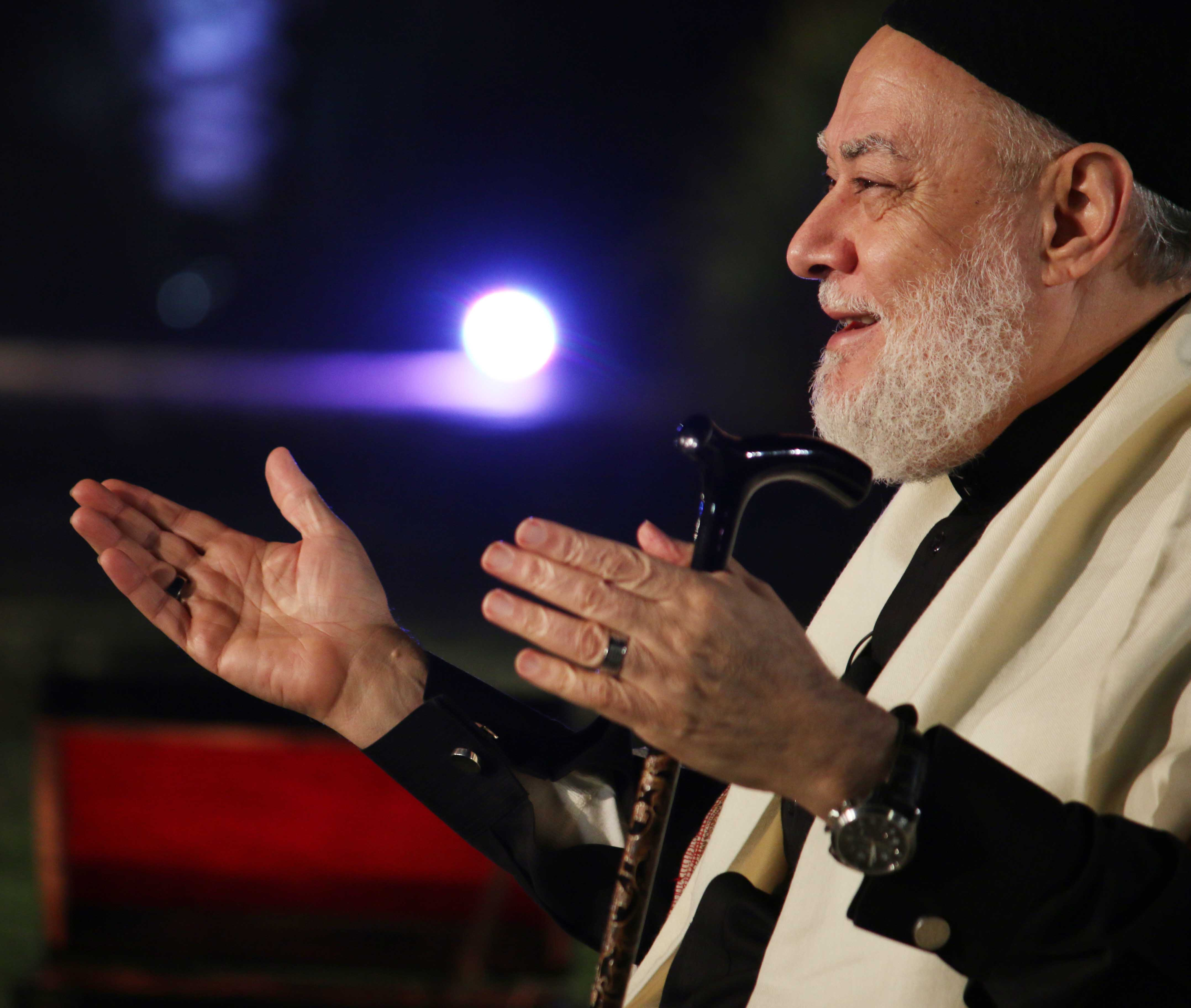 مفتي جمهورية مصر السابق